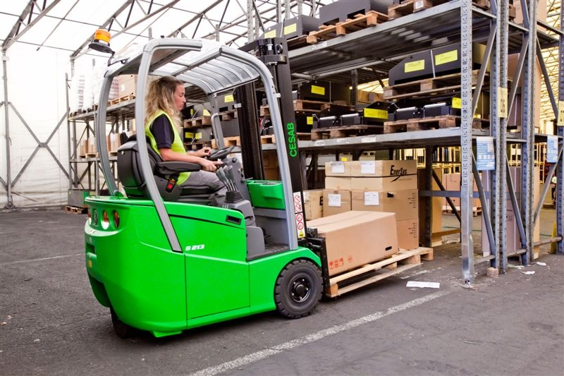 CESAB B213 trabajando en industria